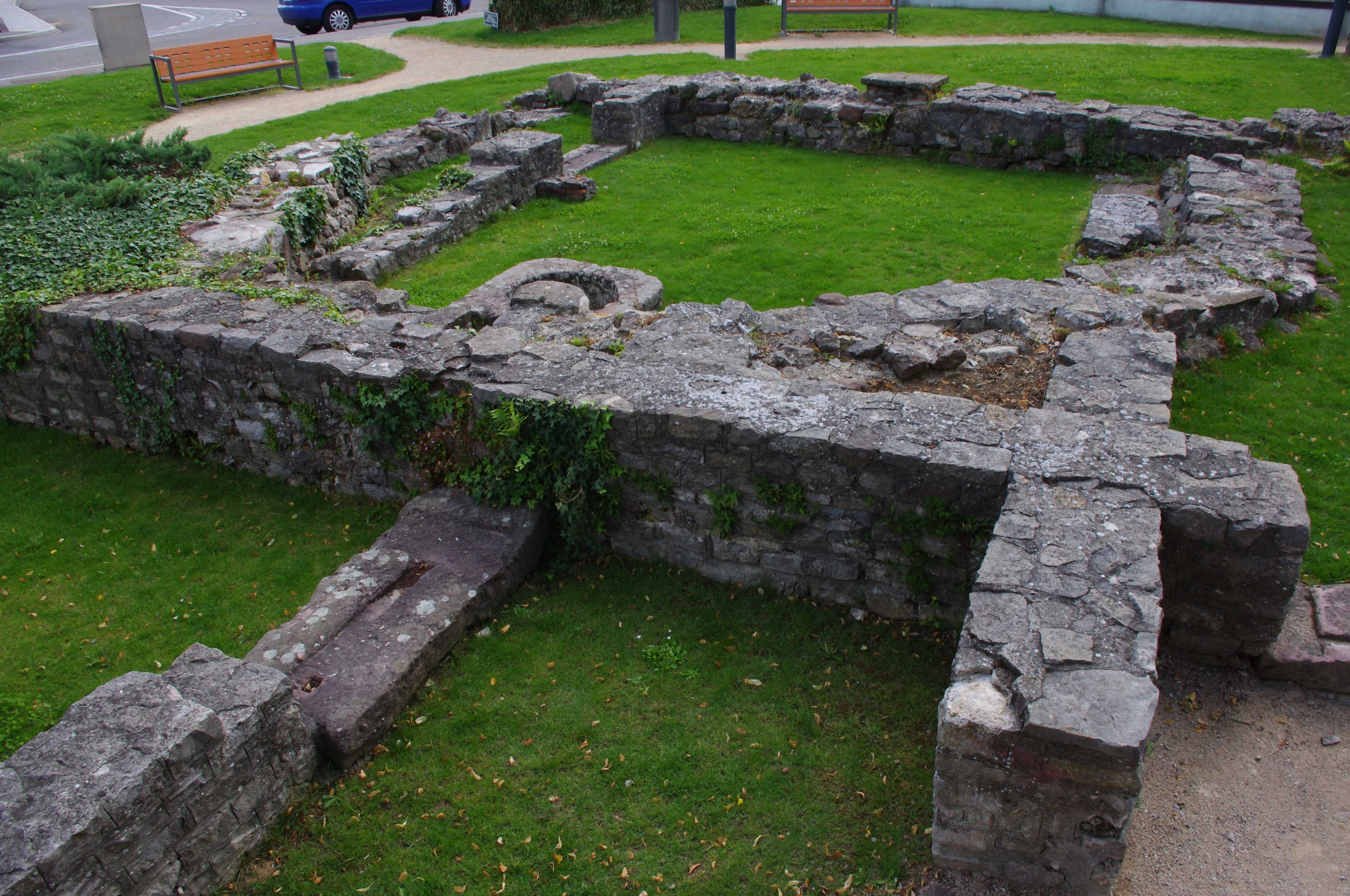 ruines époques gallo-romaine et haut moyen-âge